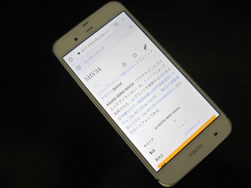 shv34white